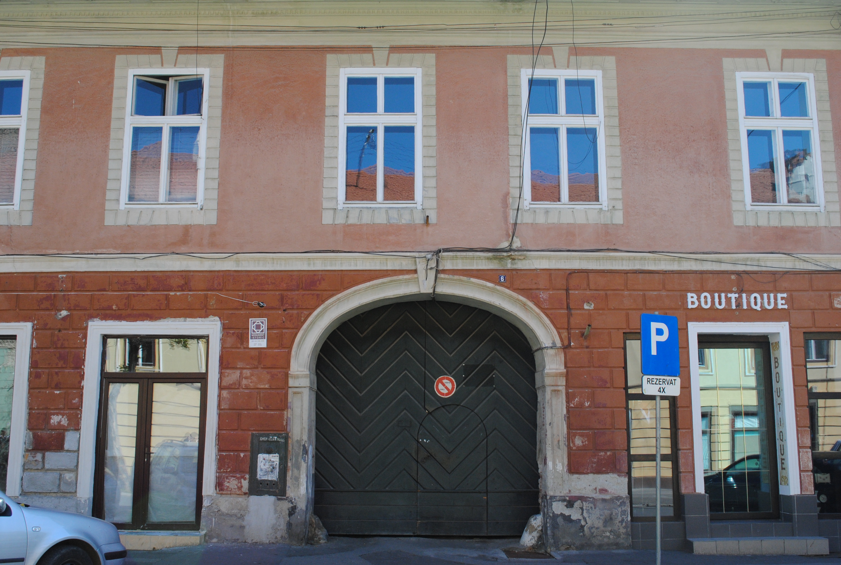 Casă, sec. XV, sec. XVII - XVIII